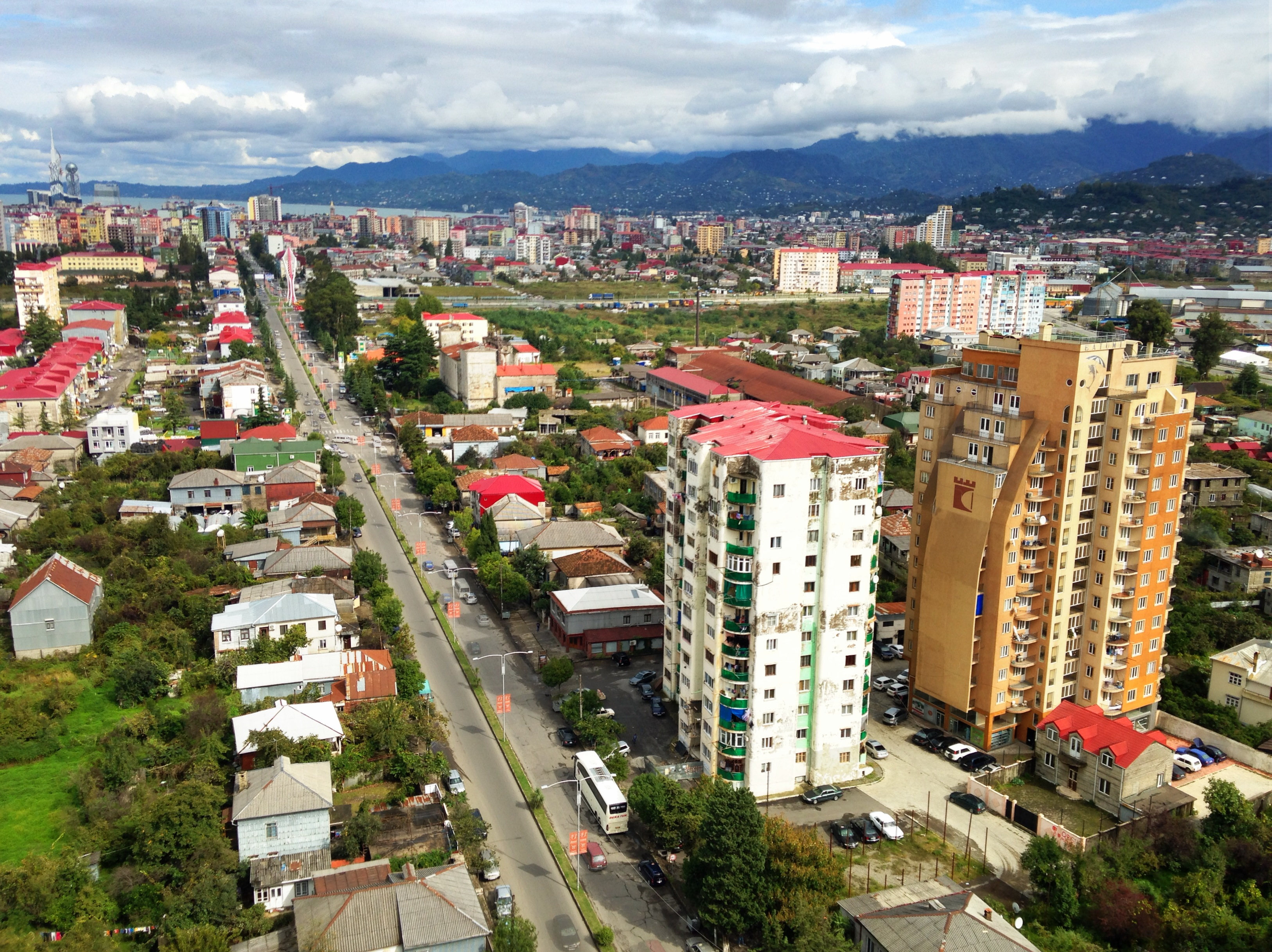 Батуми, Аджария